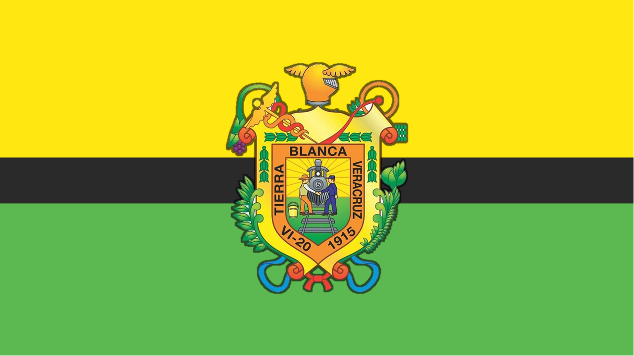 Bandera de la ciudad de Tierra Blanca, Veracruz, México